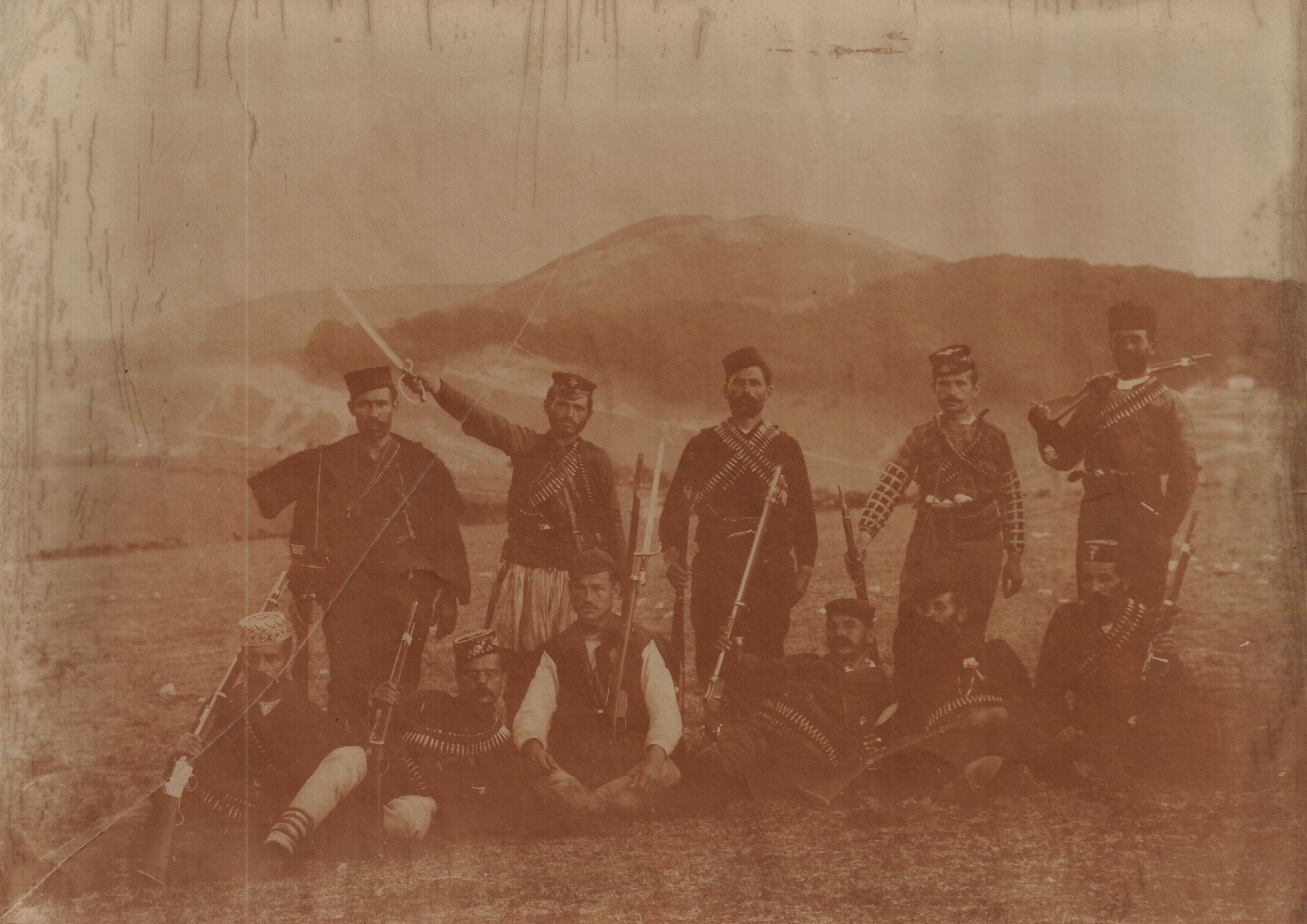 Крушевският ръководен щаб. Отпред: Тодор Павлов, Антиноген Хаджов, Тодор Христов, Тома Никлев, Никола Карев.